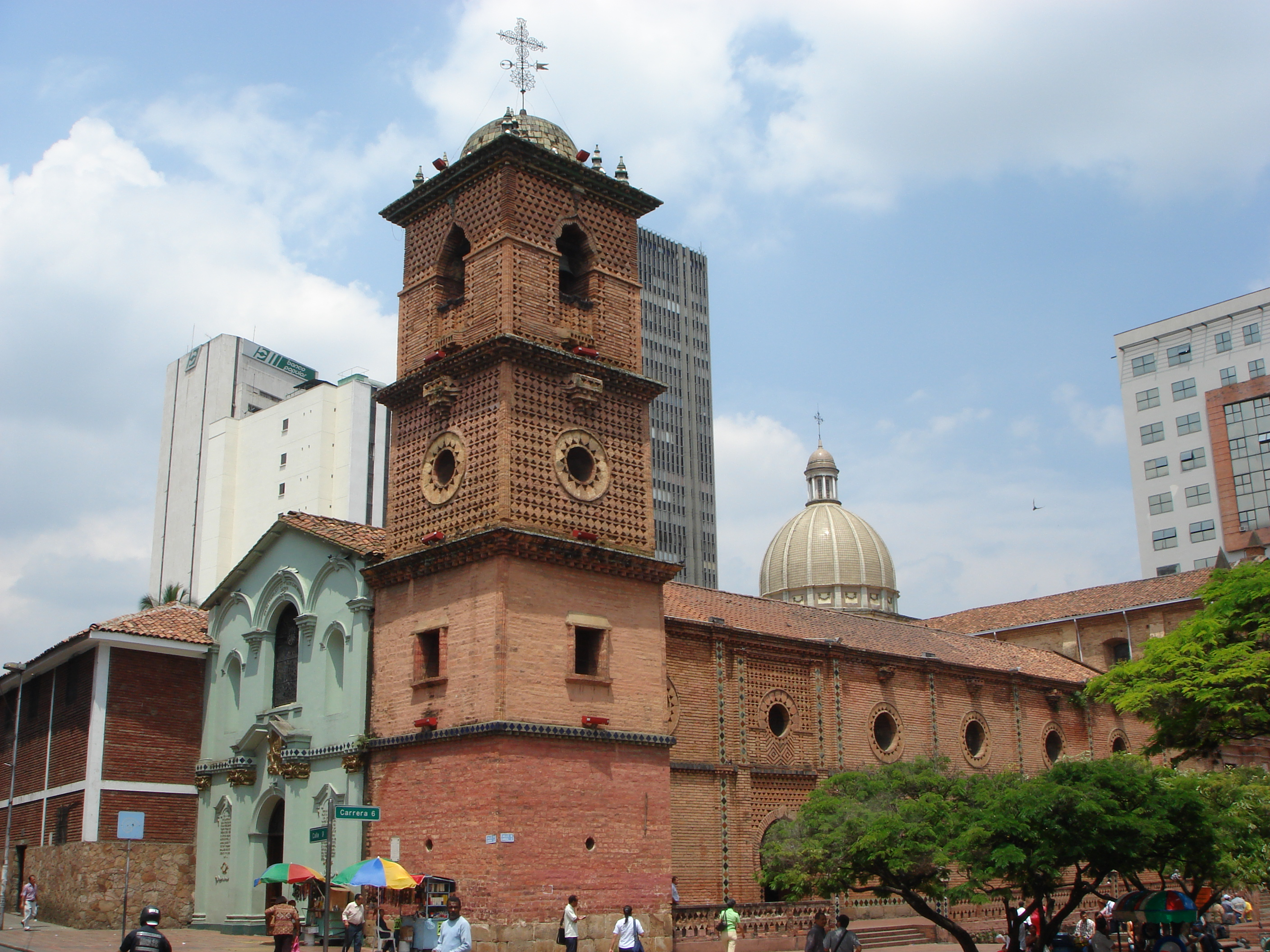 Capilla de la Inmaculada and Torre Mudejar, Cali